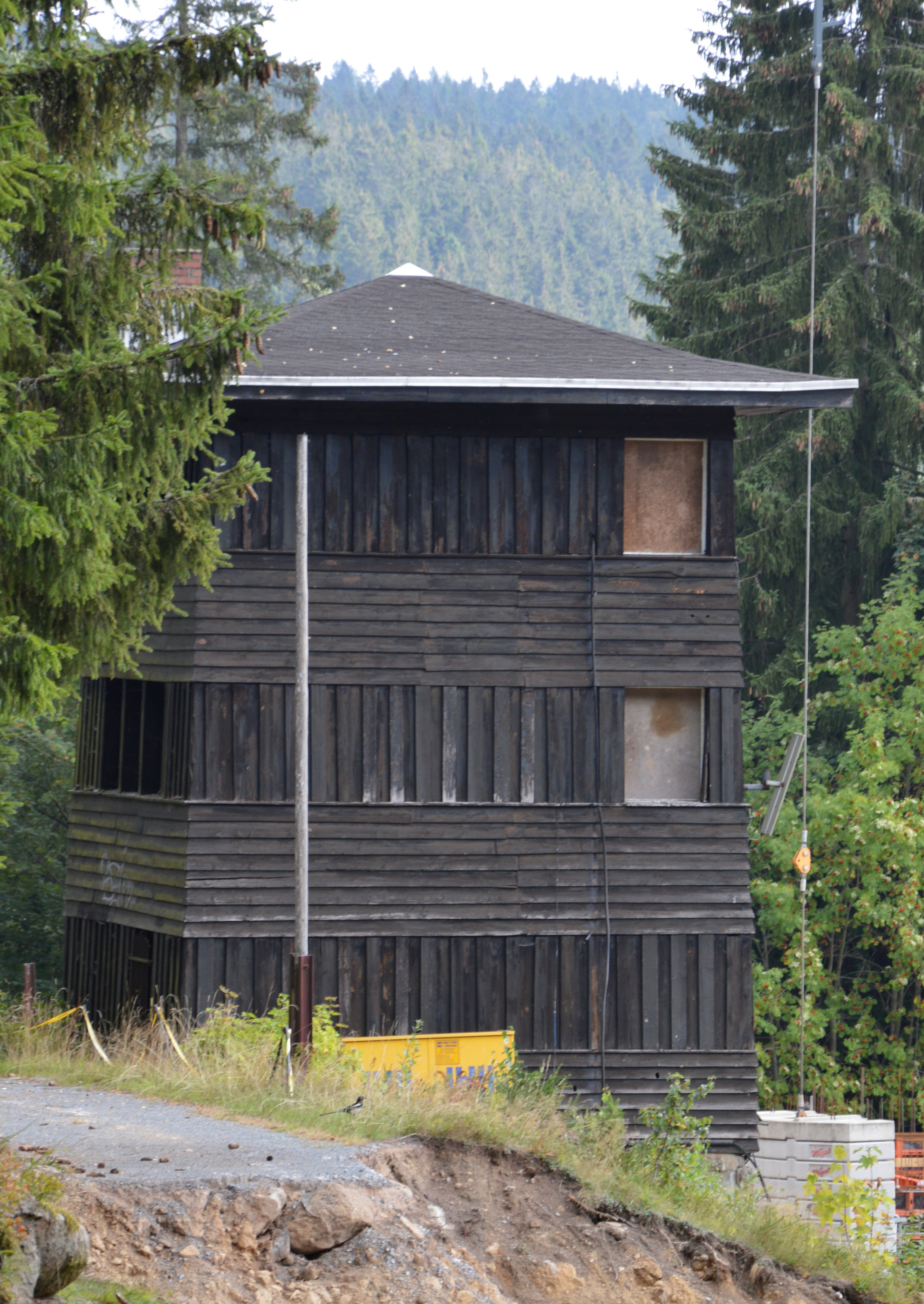 Wettkampfrichterturm am Stadion Schierke